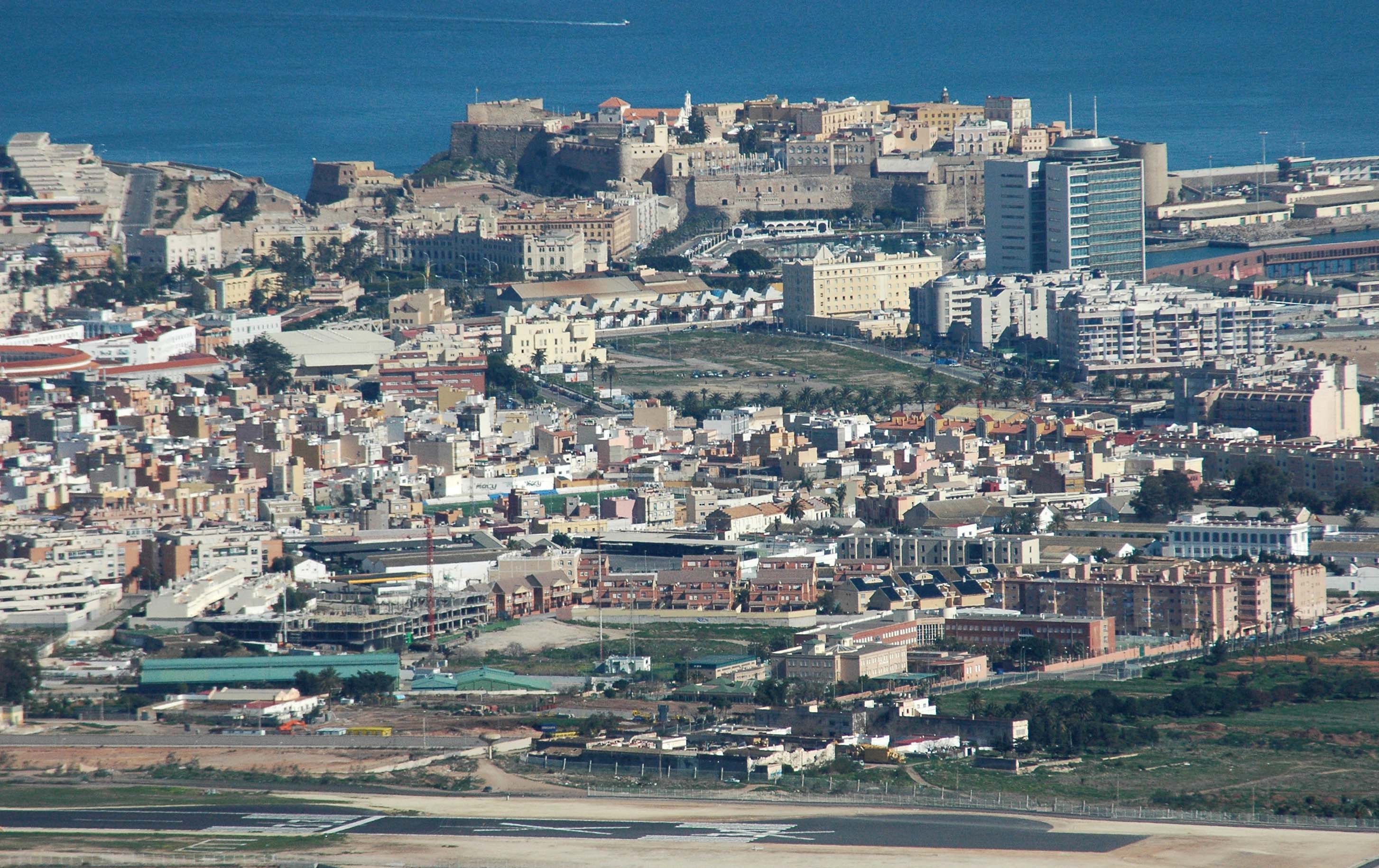 Melilla, vista desde ladera del Gurugú